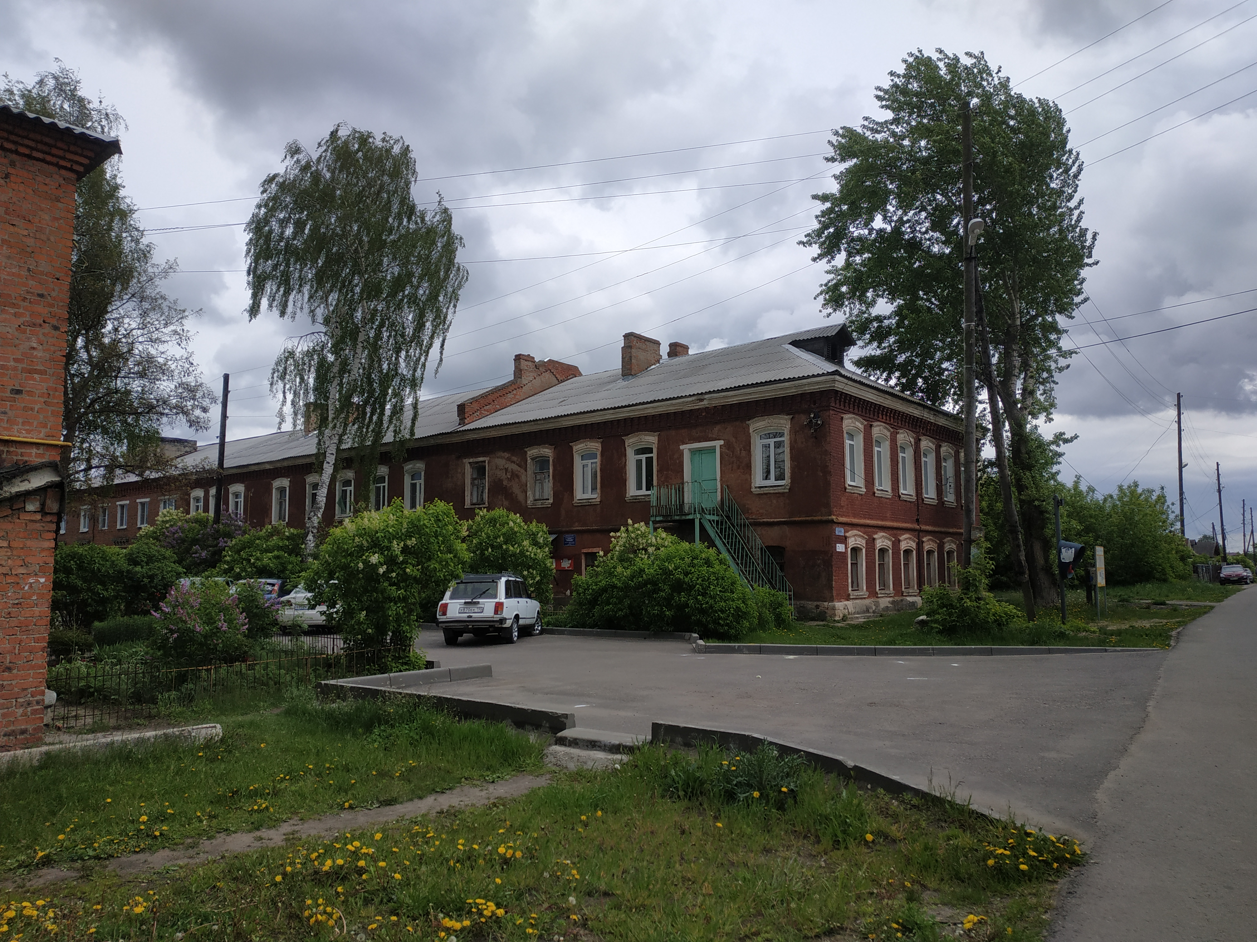 Старое Бобренево